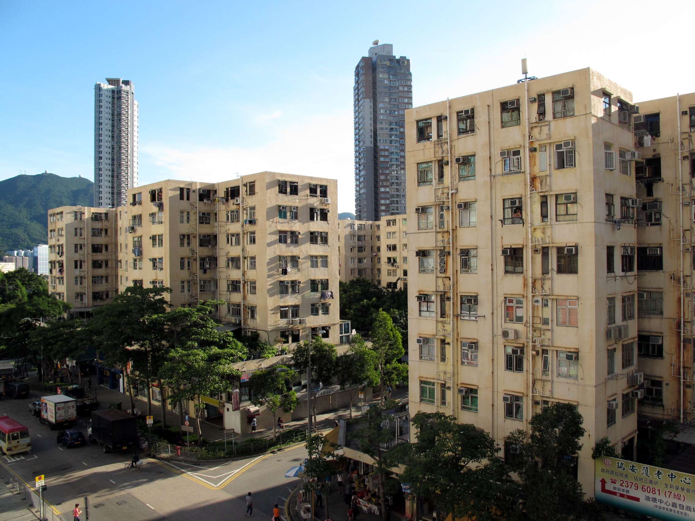 Yau Tong Centre 油塘中心